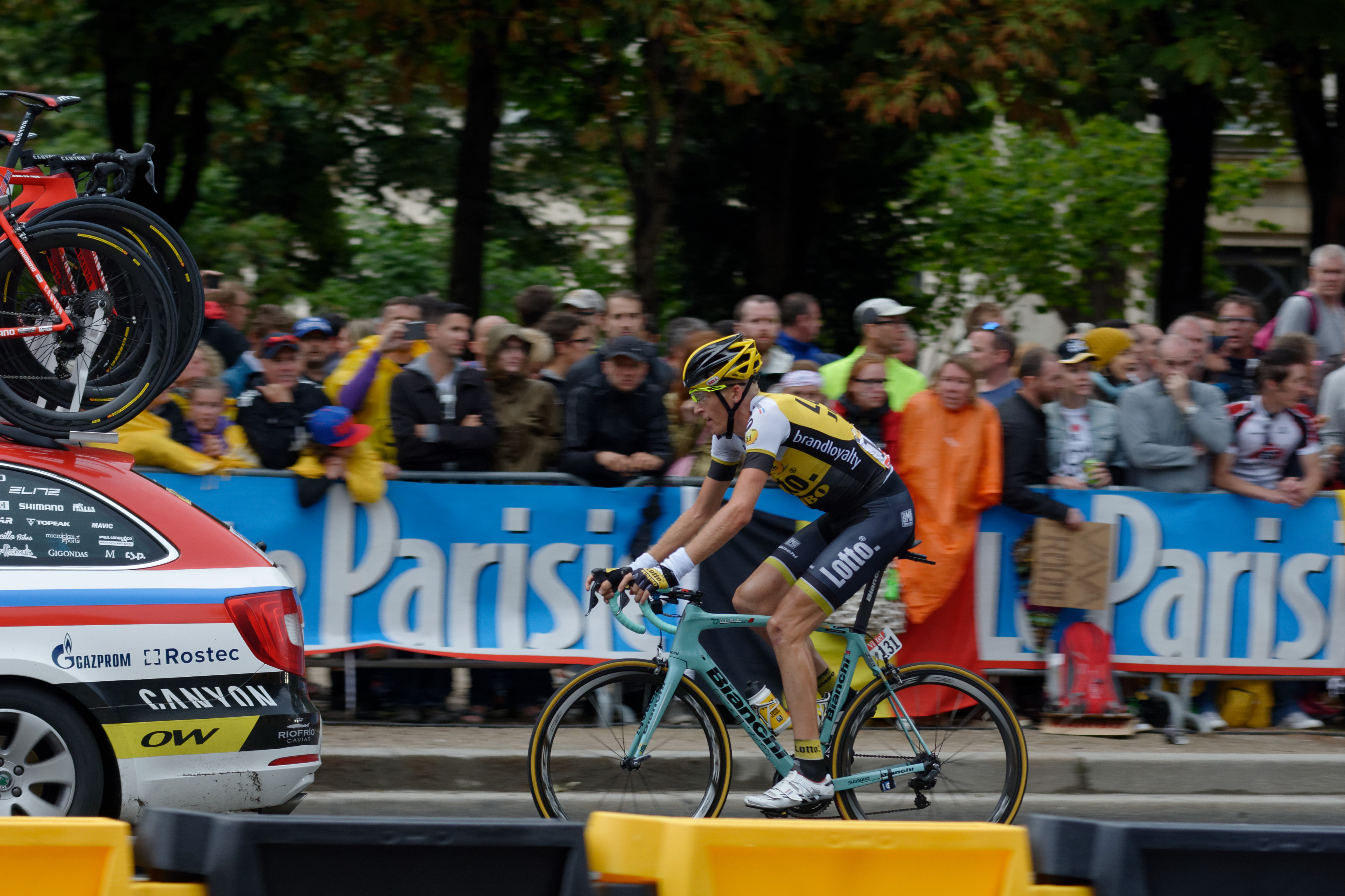 D71_3114_DxO